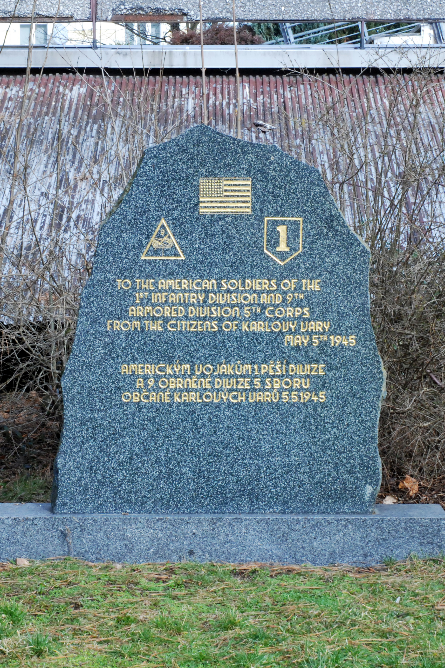 Pomník vojákům Americké armády v Karlových Varech